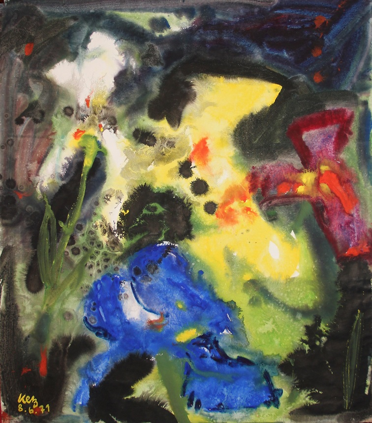 Aquarell 80 x 70 cm